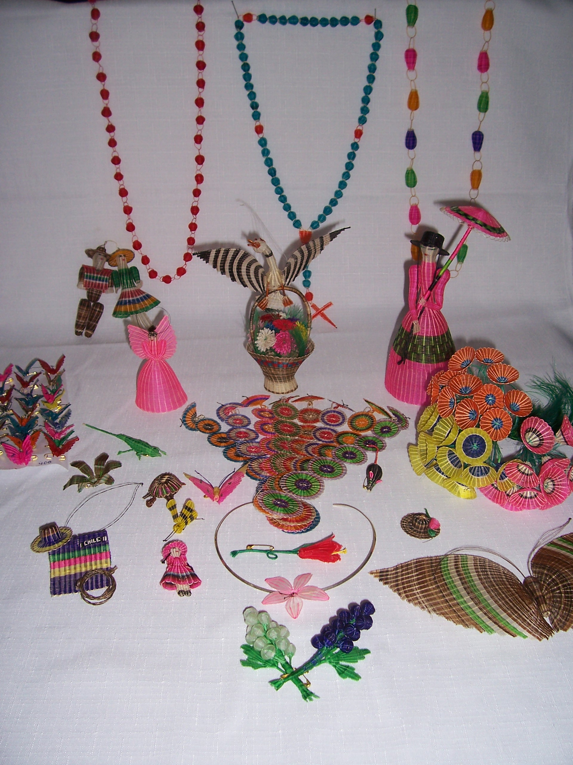 Artesania en Crin